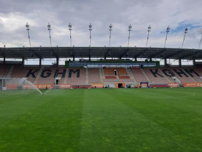 Westtribüne des Stadion Zagłębia Lubin.